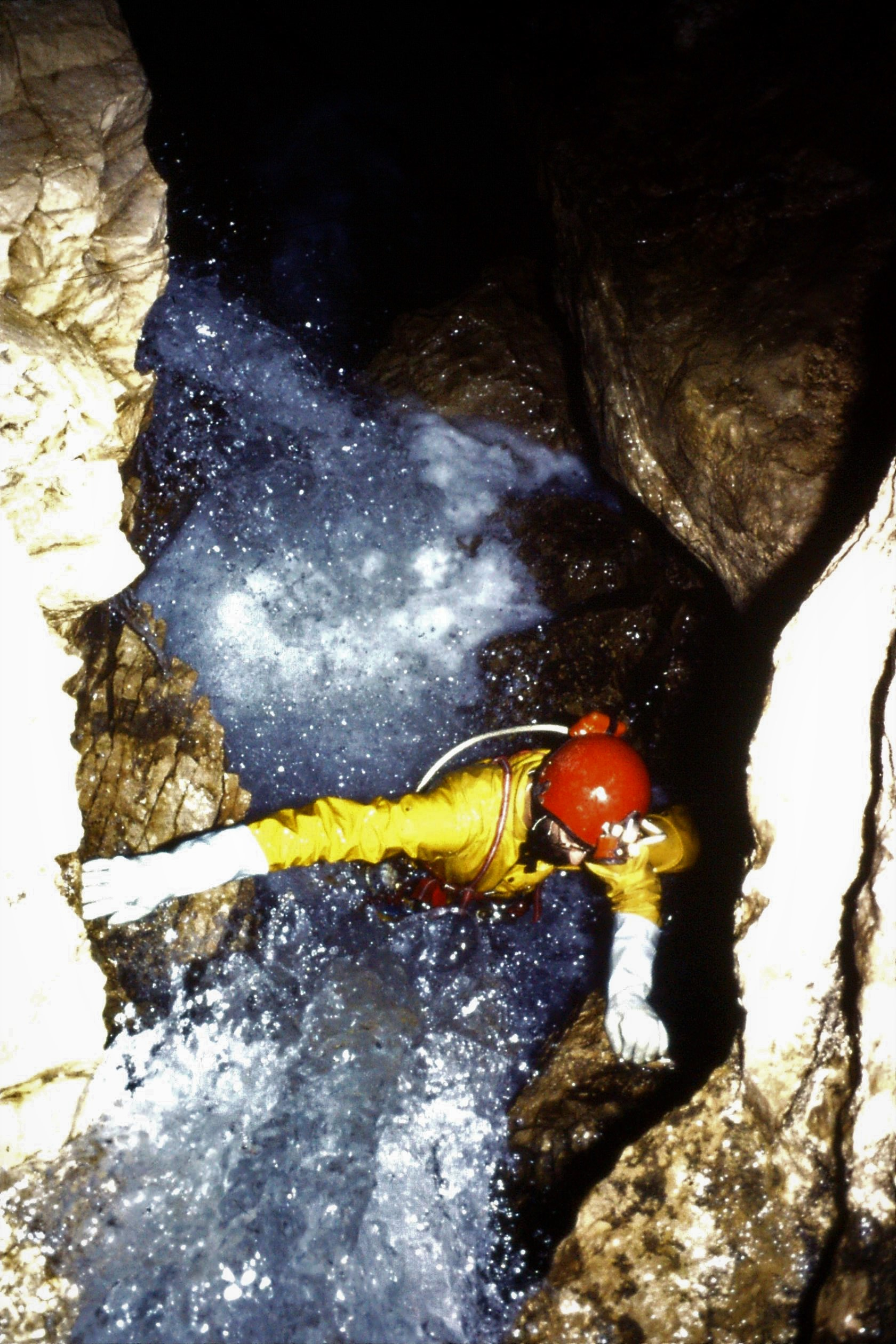 Au début de la grotte de Bournillon dans la rivière en crue.